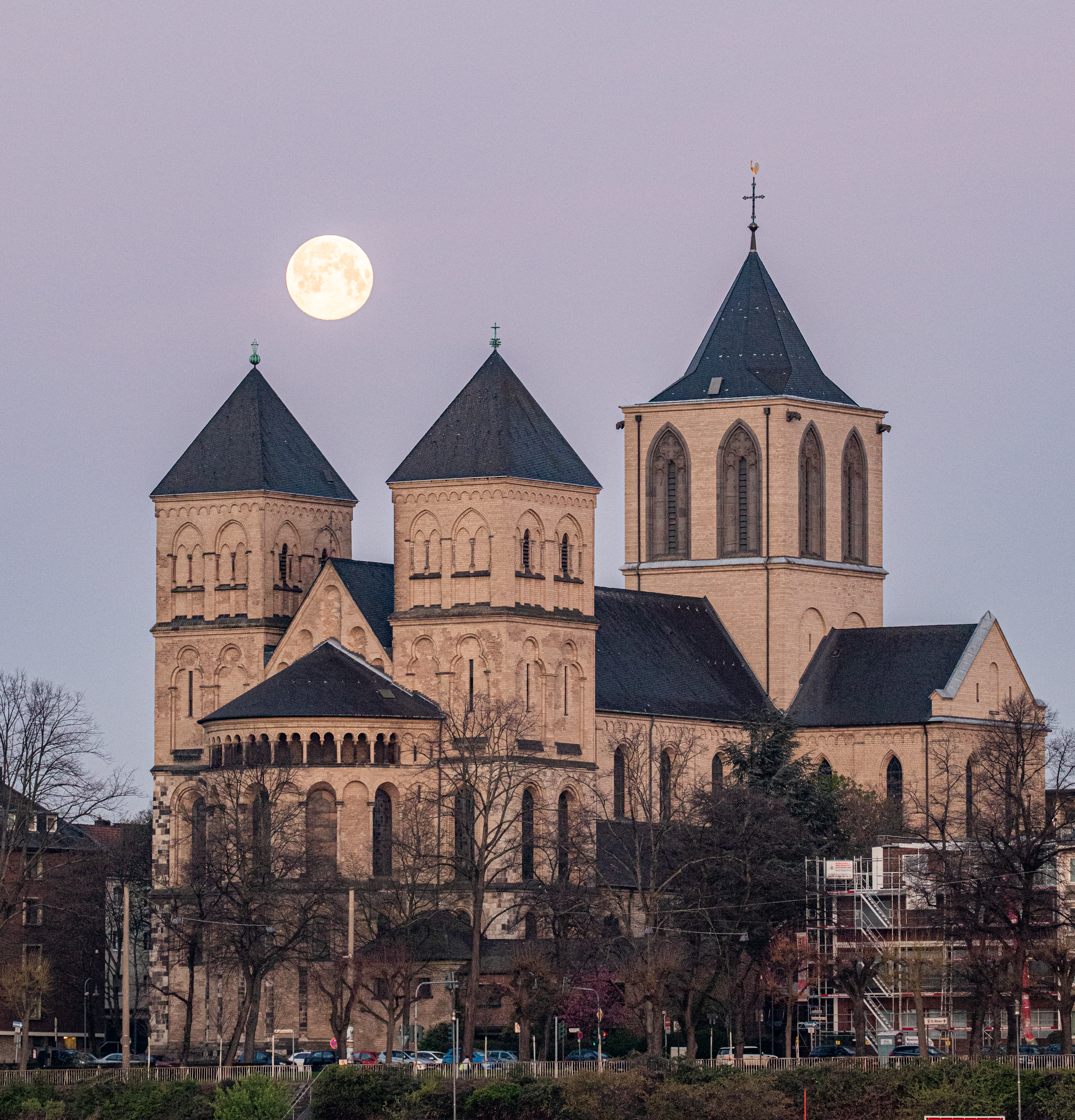 St.Kunibert - 08. April 2020